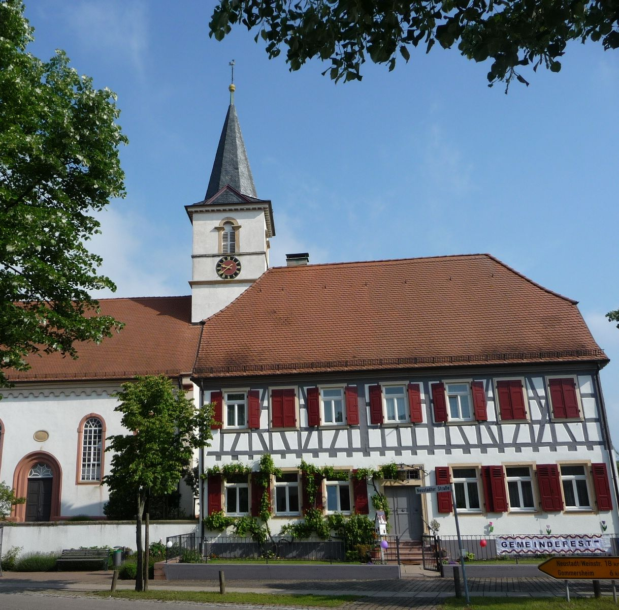 protestantische Kirche und Pfarrhaus